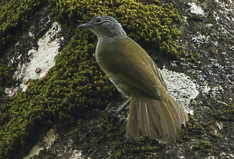 Shelley's Greenbul - Kakamega Kenya 06_2560